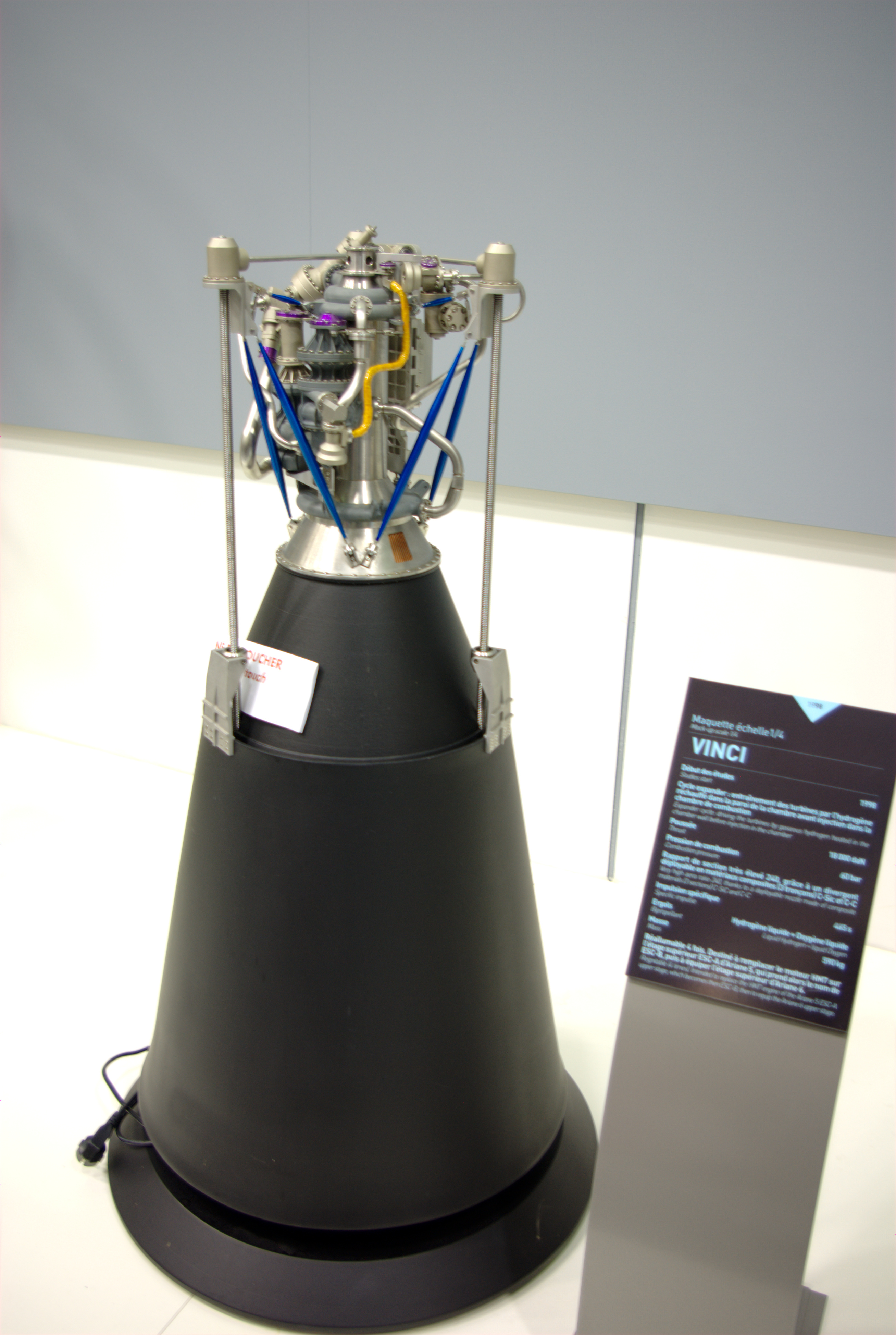 Maquette échelle 1/4 du moteur Vinci exposée au musée Safran.